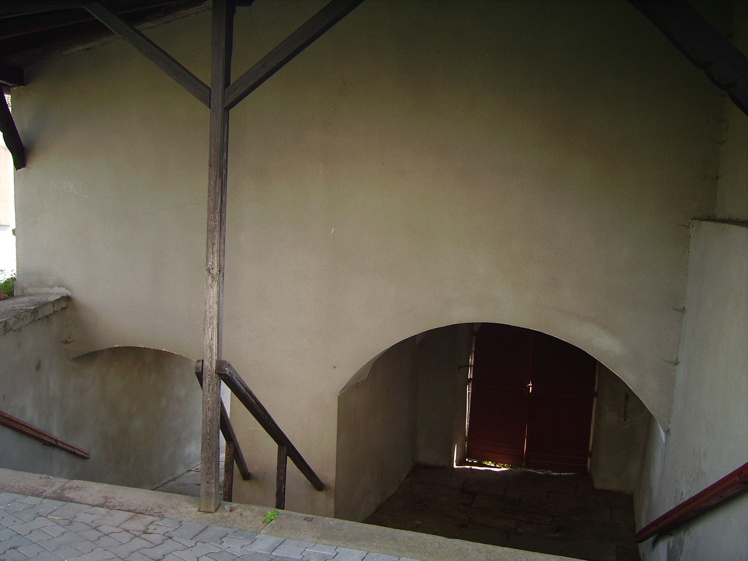 Pławna Dolna budynek bramny; brama z niewielkim pomieszczeniem nad wejściem - małe samborze, szachulcowy, z drugiej poł. XVIII w.